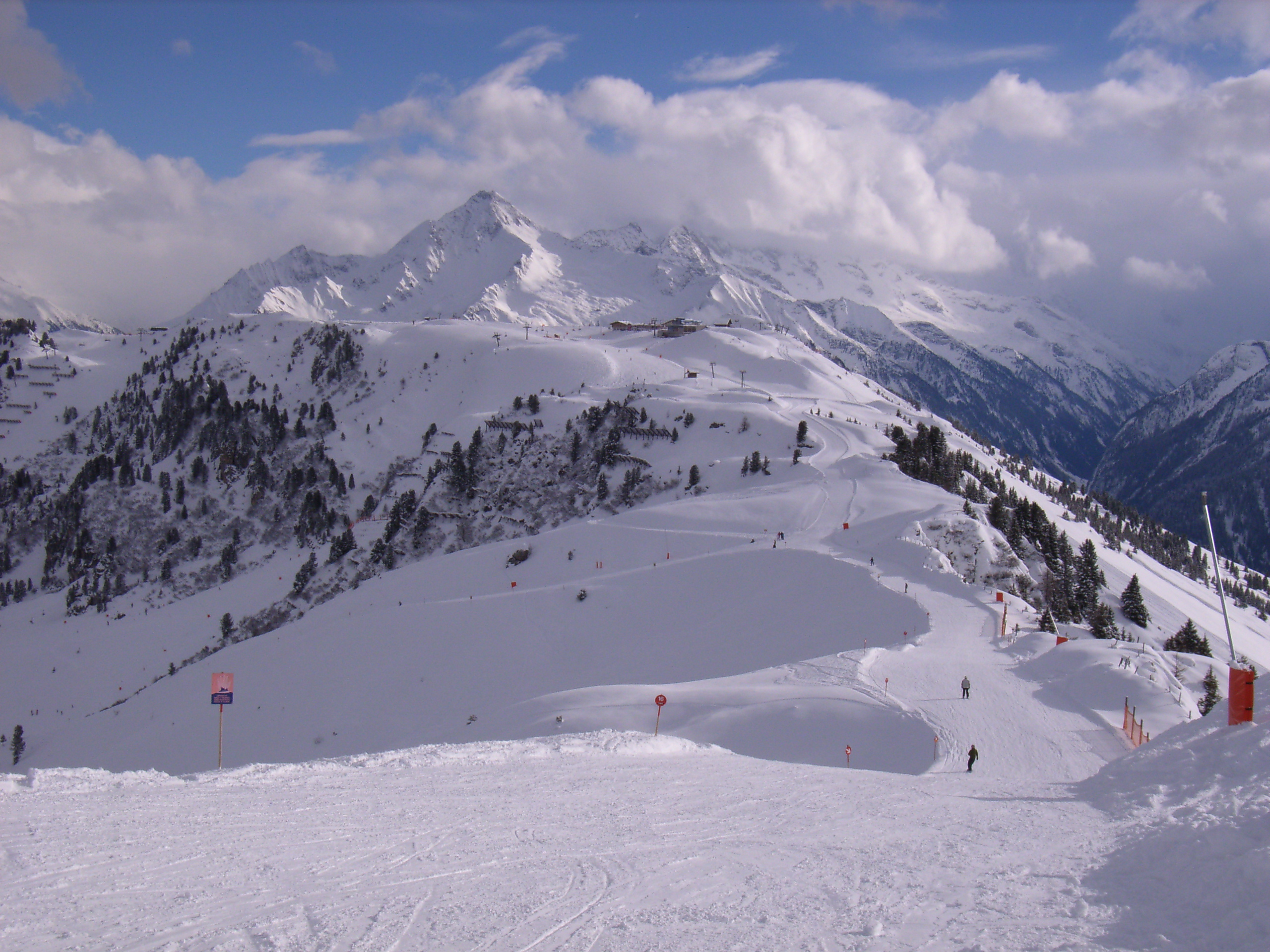 Das Gipfelplateau des Penken, im Schigebiet Ski Zillertal 3000 (ein wenig östlich der Wanglalm)